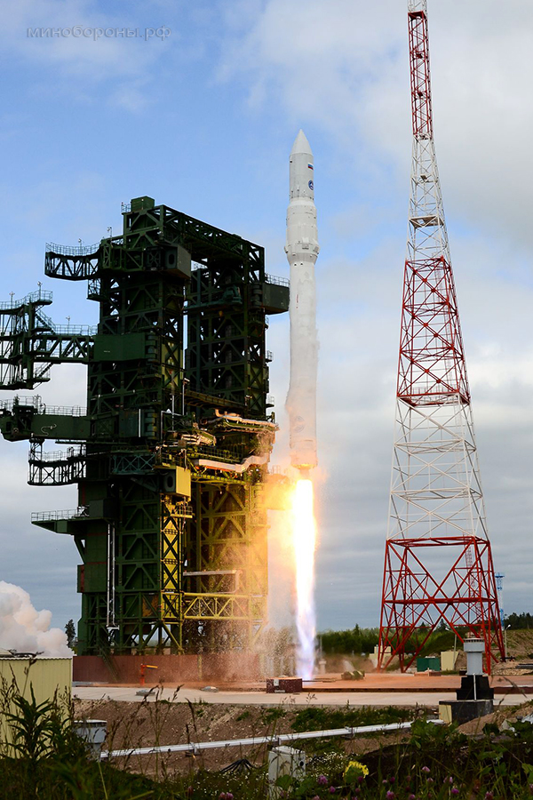 Первый испытательный пуск ракеты-носителя «Ангара-1.2ПП» (ГИК Плесецк, Архангельская обл.)